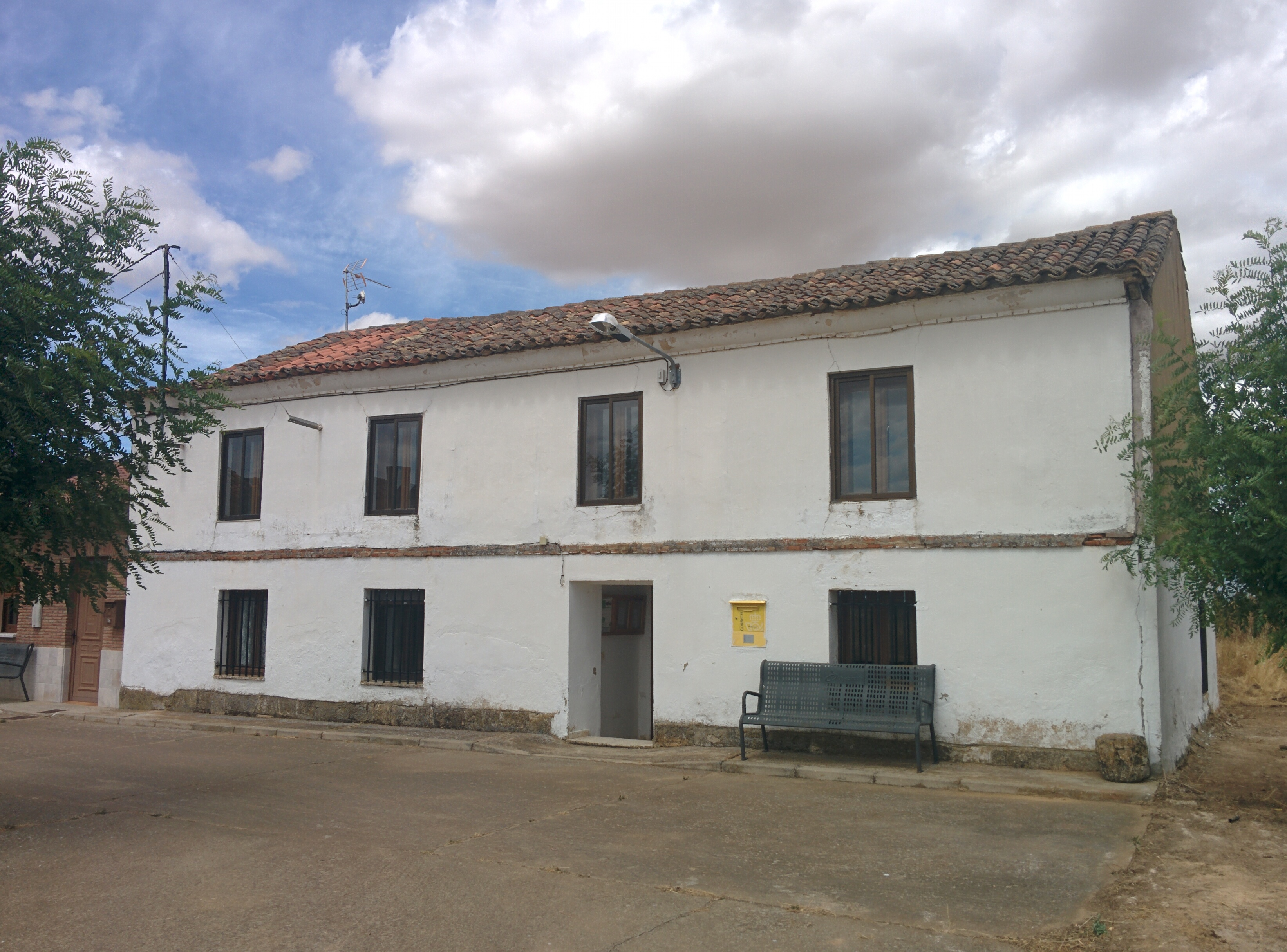 Casa consistorial de Palacios de Riopisuerga (Burgos, España).